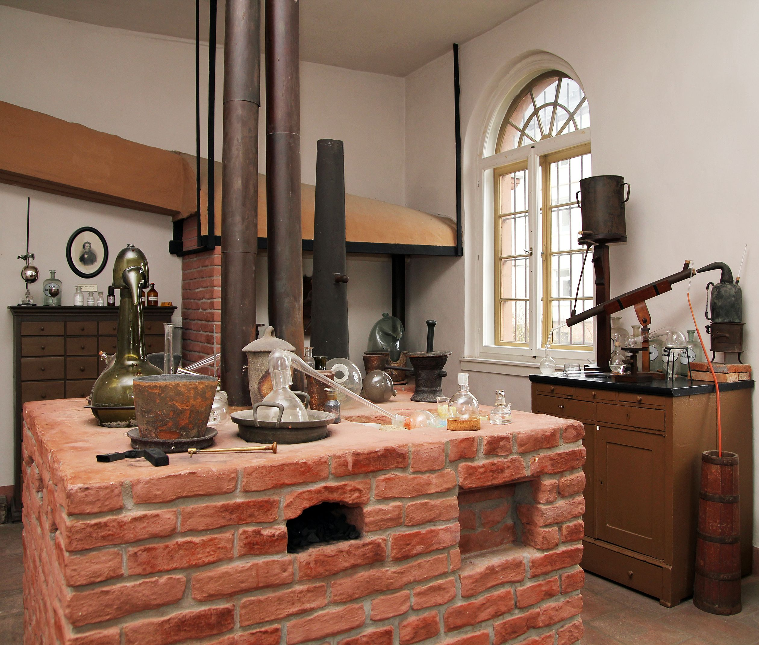 Das Alte Labor im Liebigmuseum Gießen